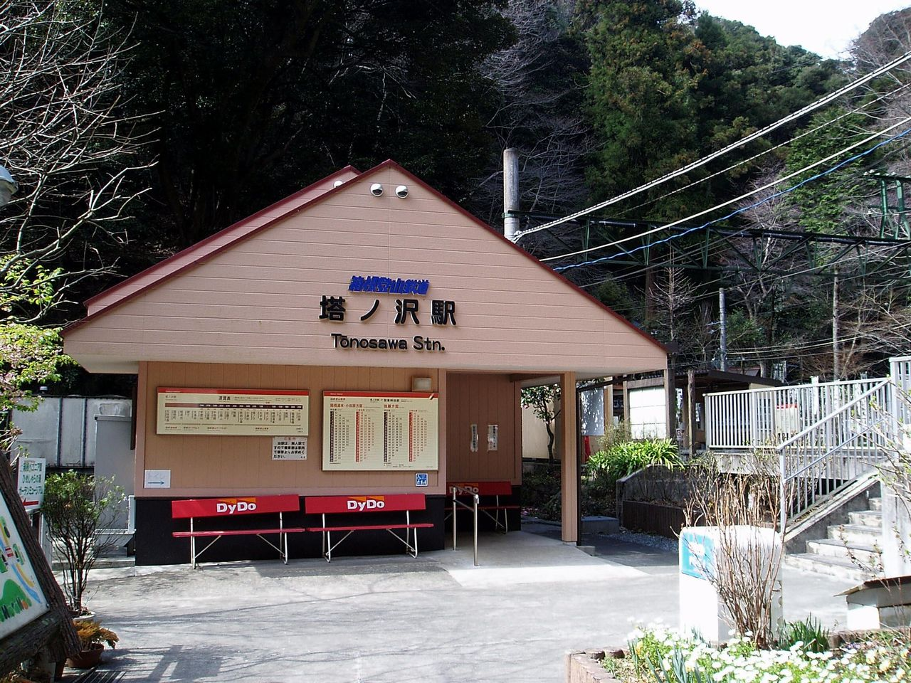 Tōnosawa Station, on the Hakone Tozan Line, Hakone, Kanagawaja:塔ノ沢駅